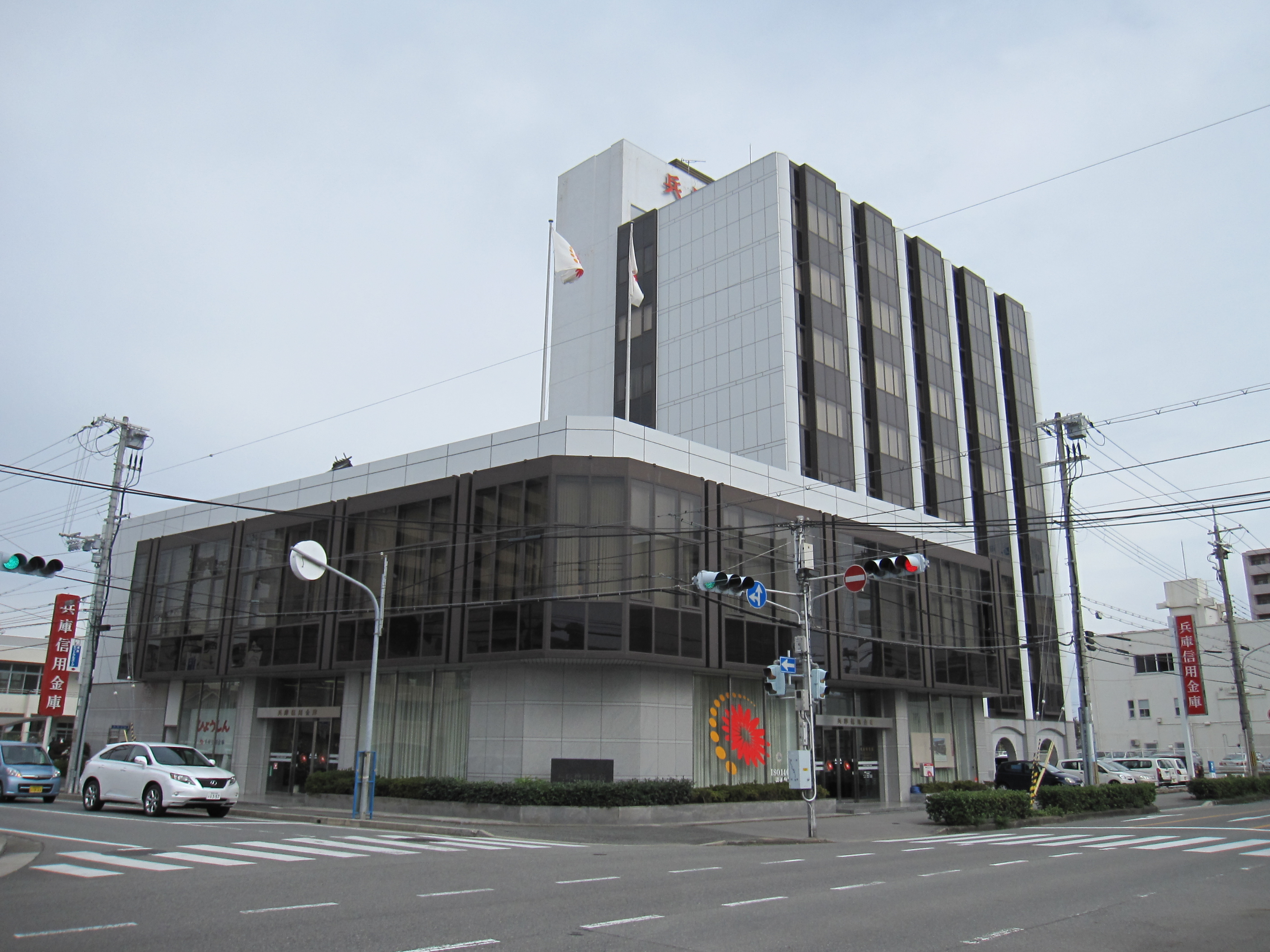 兵庫信用金庫本店